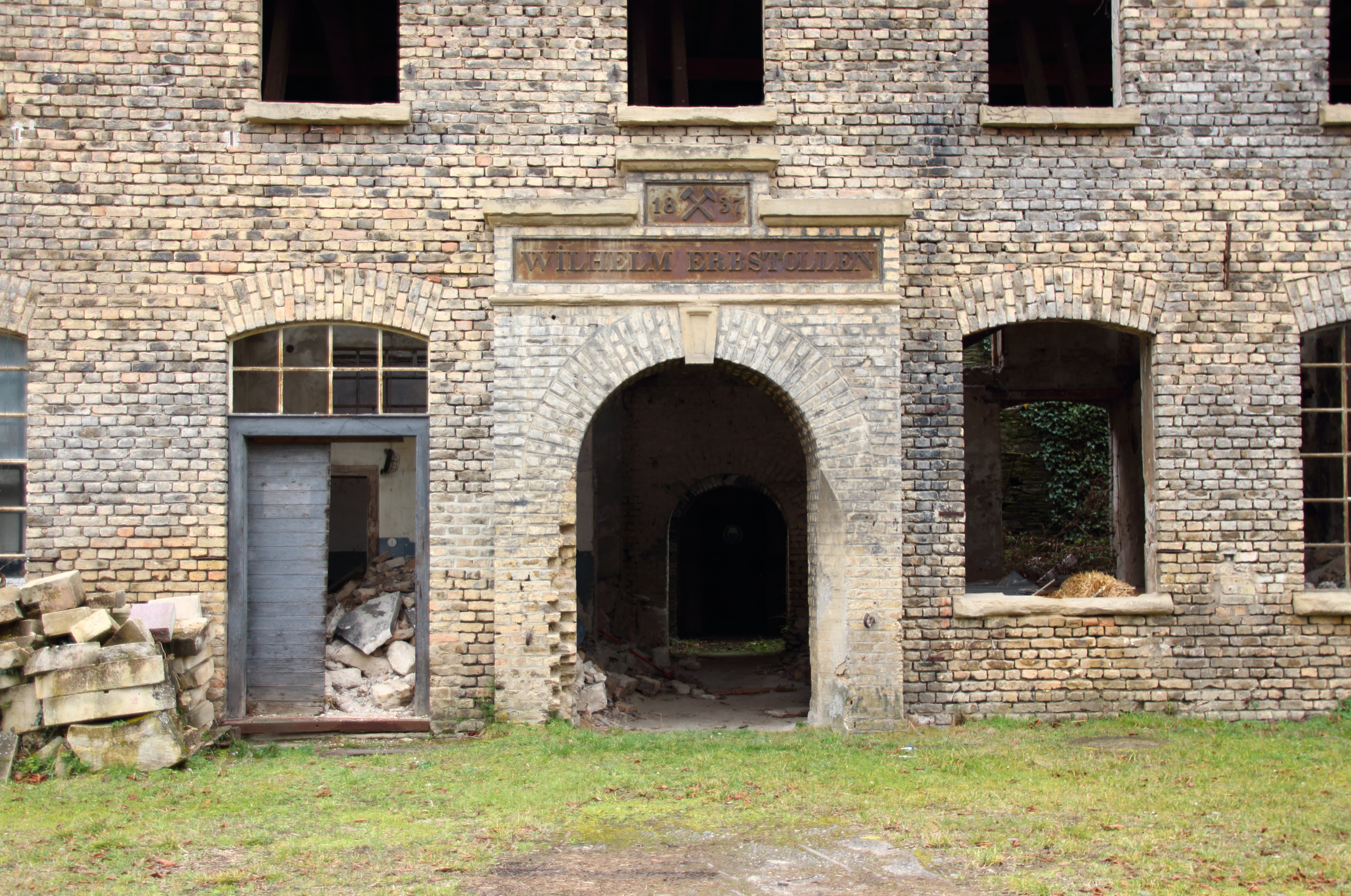 Portal des Zechenhauses, dahinter der Eingang zum Stollen. Wilhelm Erbstollen, Kaub